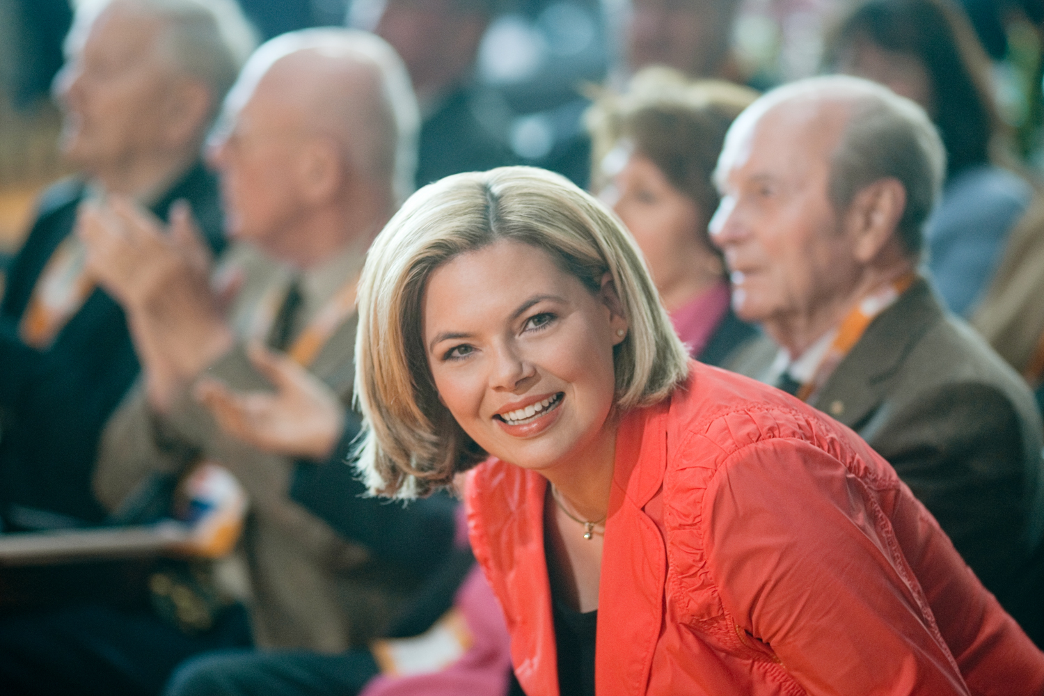 Julia Klöckner, Spitzenkandidatin der CDU Rheinland-Pfalz für die Landtagswahl 2011